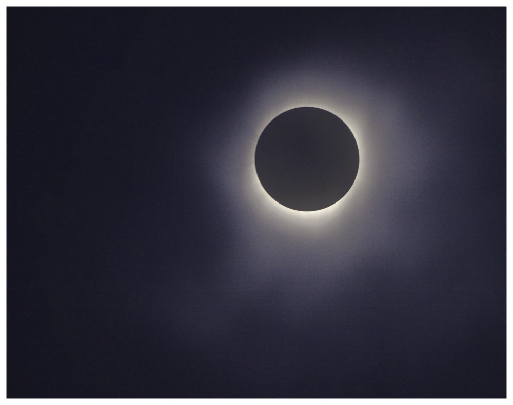 Sonnenfinsternis 22.7.2009, Wuzhen, China. Fotografiert mit Canon EOS 50D-1/0.6Sek-f/5.6-ISO800-400mm-DRI.5-Canon EF 70-200/2.8 L IS USM-Canon EF Extender 2,0x II